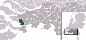 De locatie van Bergen op Zoom